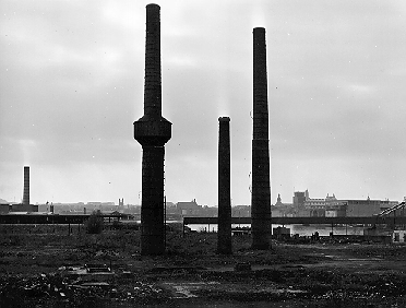 Verwoeste fabrieksgebouwen en overgebleven schoorstenen op het terrein van de "Maastrichtsche Zinkwit Maatschappij" aan de Franciscus Romanusweg in Maastricht. Dit deel van de fabriek was in 1944 grotendeels verwoest door een bombardement. Fotocollectie RHCL Maastricht, GAM 161.